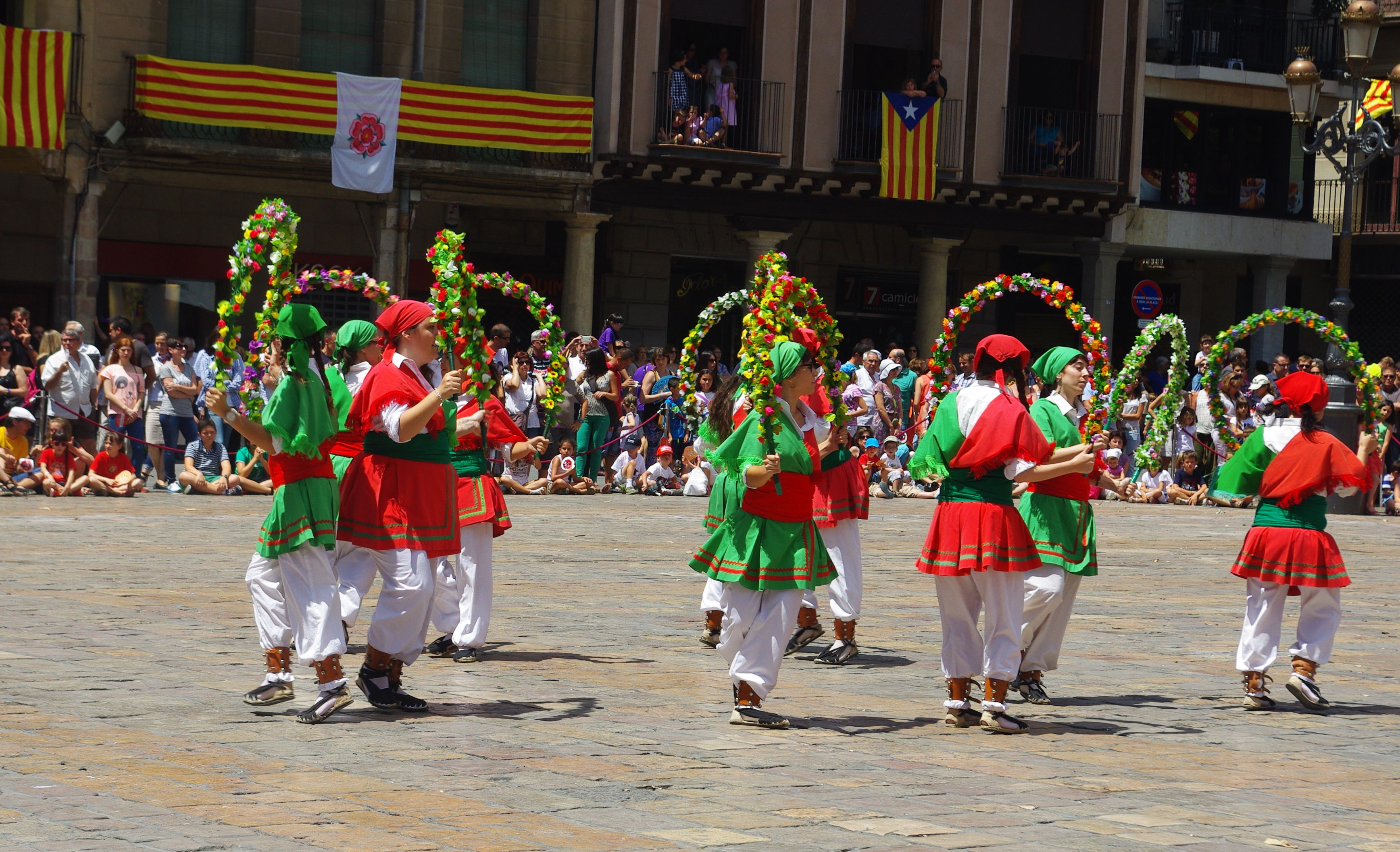 Sant Pere 2014. Ball de Cercolets